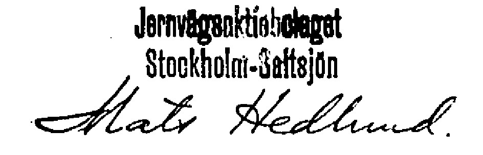 Mats Hedlund, verkställande direktör vid Järnvägs AB Stockholm–Saltsjön 1911–1913.